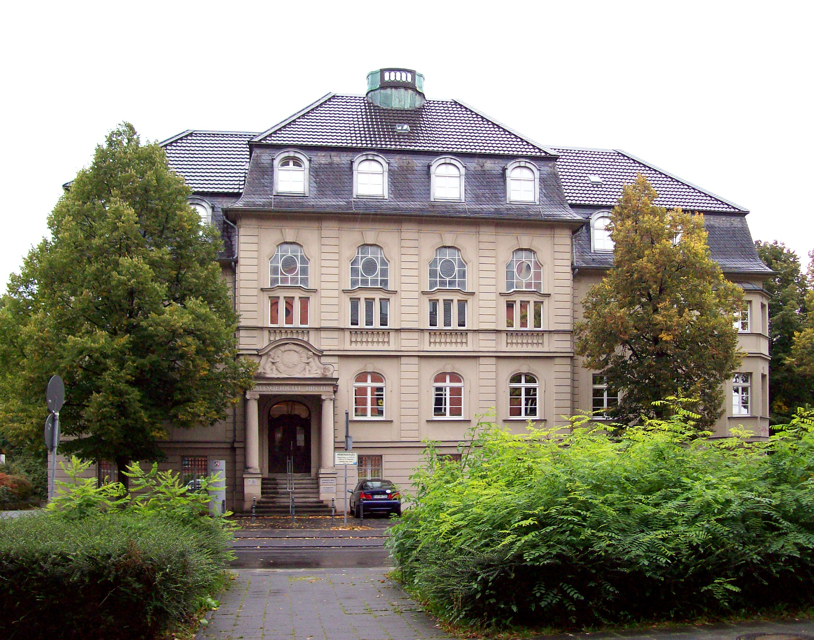 Amtsgericht Brühl (ehemaliges Rathaus der Bürgermeisterei Brühl-Land), Clemens-August-Straße 34, Brühl